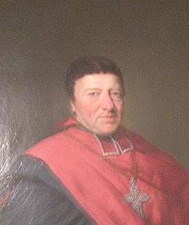 Lothar Anselm Freiherr von Gebsattel (Ausschnitt aus Photographie eines Gemäldes in der Dombibliothek Freising